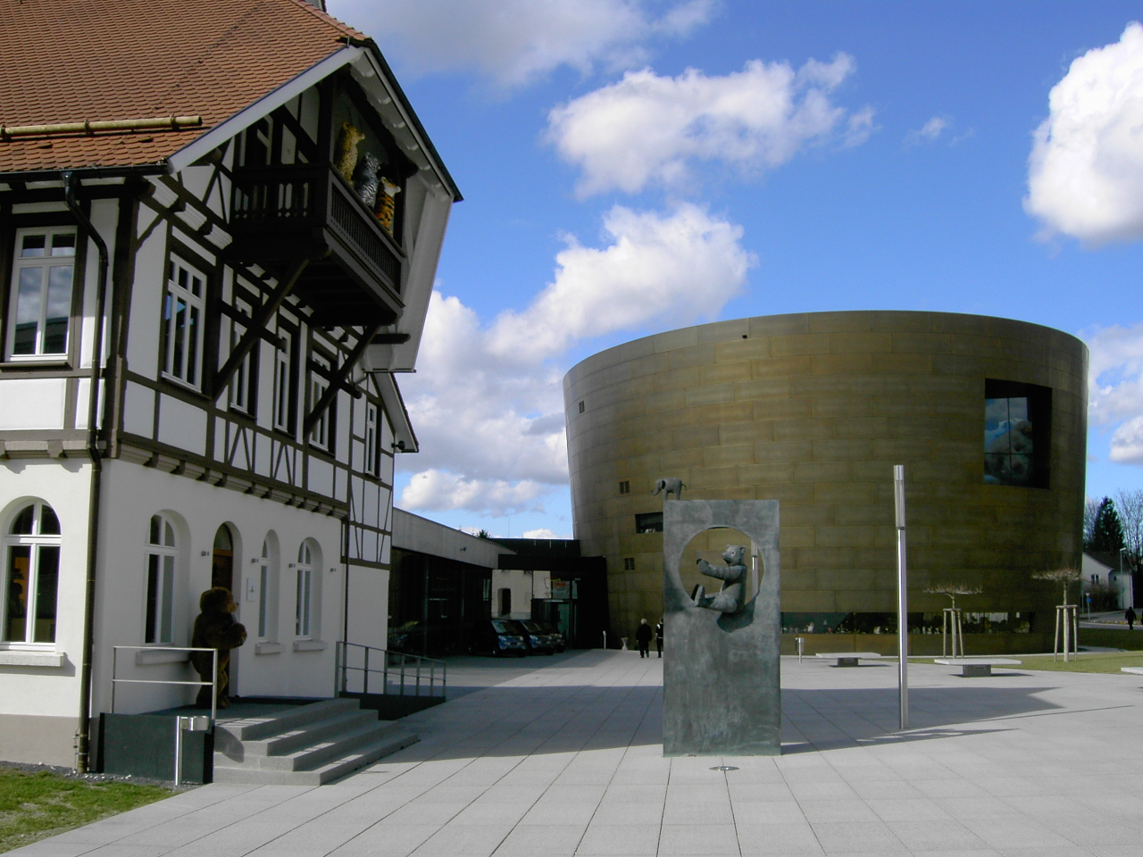 Die Welt von Steiff in Giengen an der Brenz, Germany